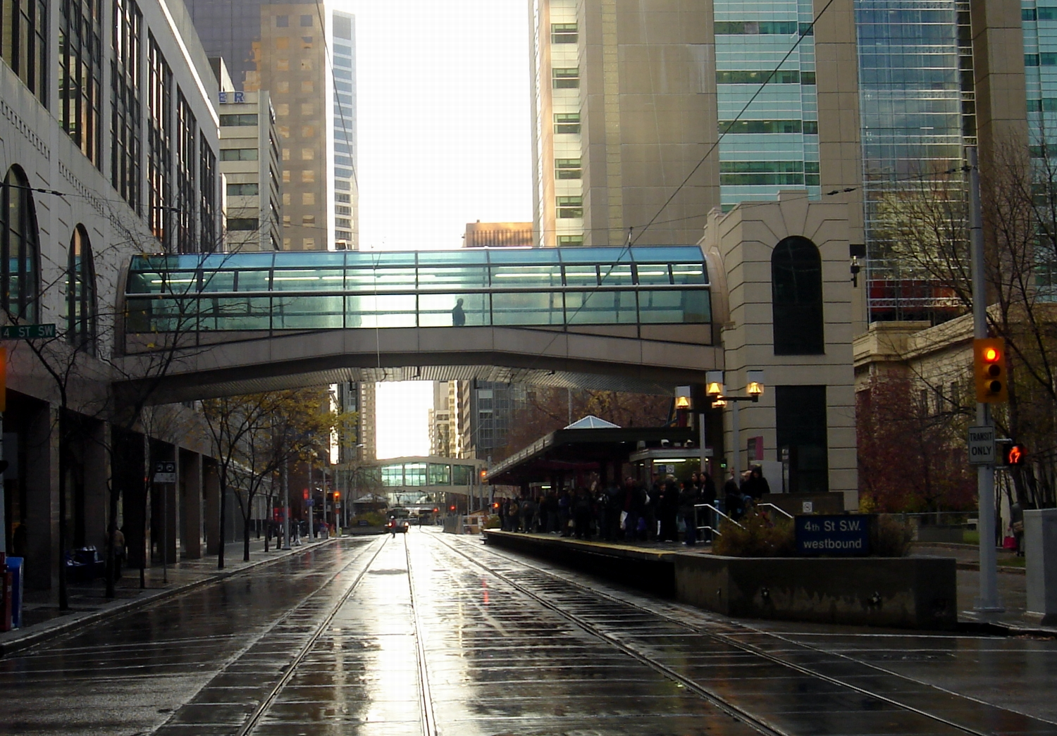 Plus 15 skywalks in Calgary, Alberta, Canada